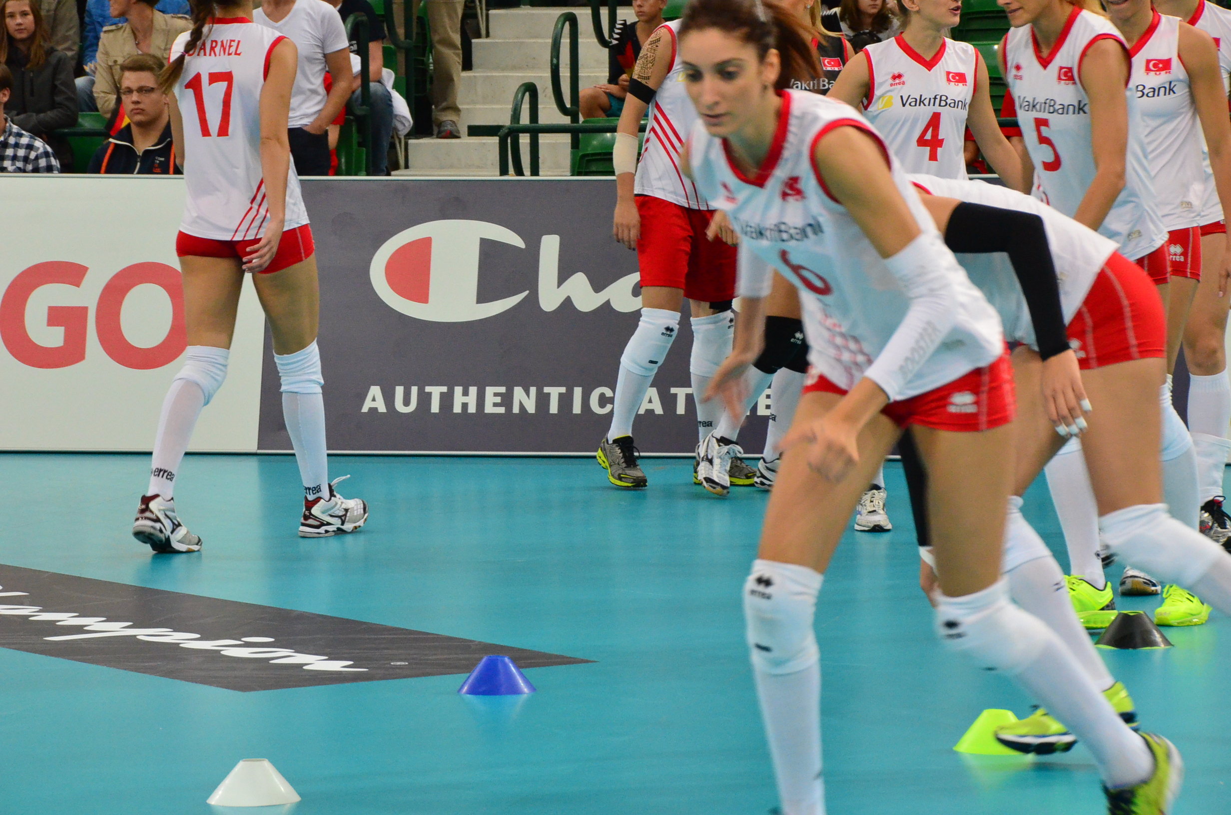 Volleyball-Europameisterschaft der Frauen 2013-Spielort Halle (Westf) Gerry-Weber-Stadion - Spiel 8. September 2013 (Deutschland-Türkei)